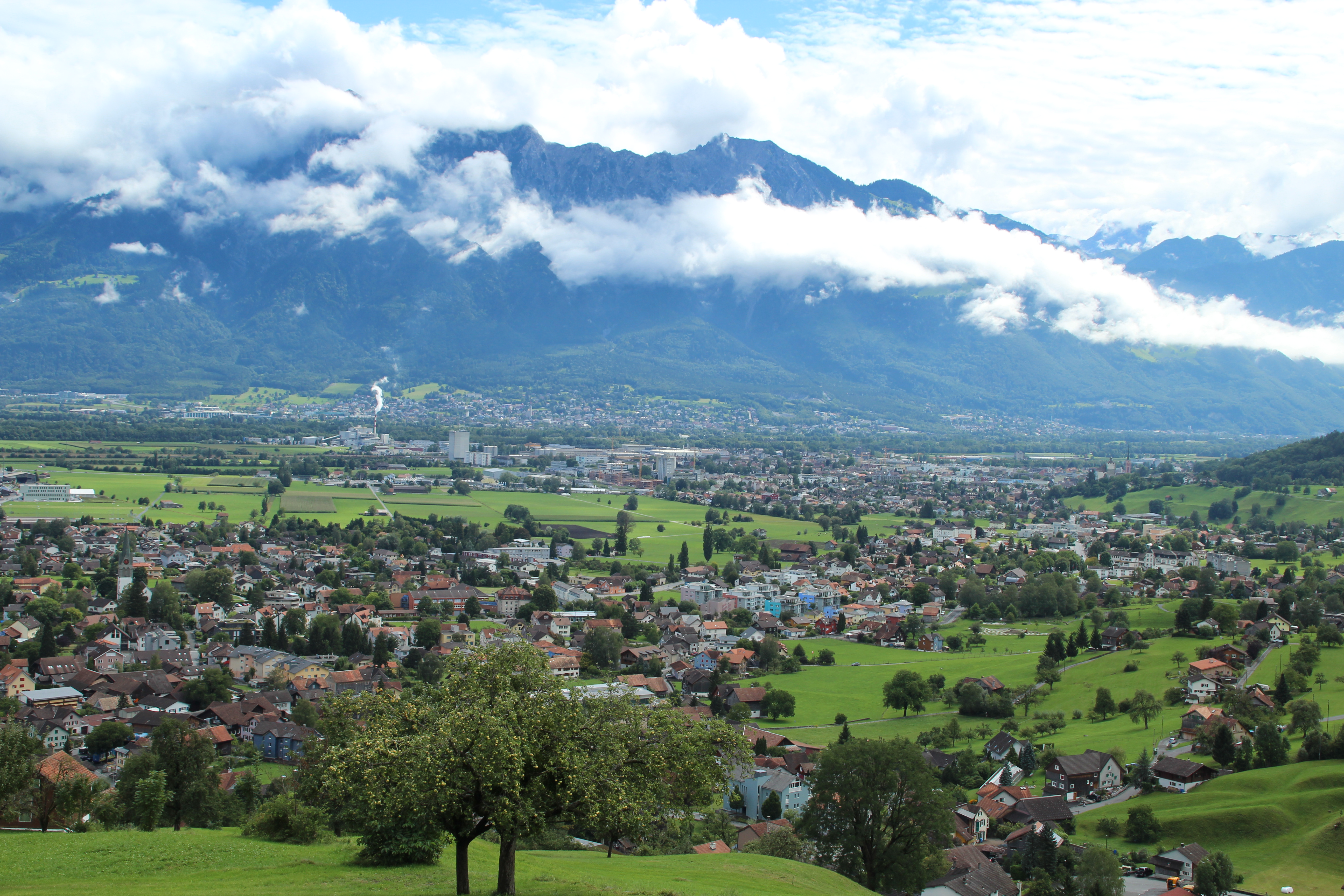 Grabs